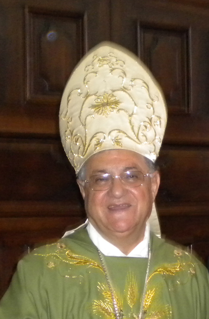 Jerusalem Latin Patriarch Fouad Twal